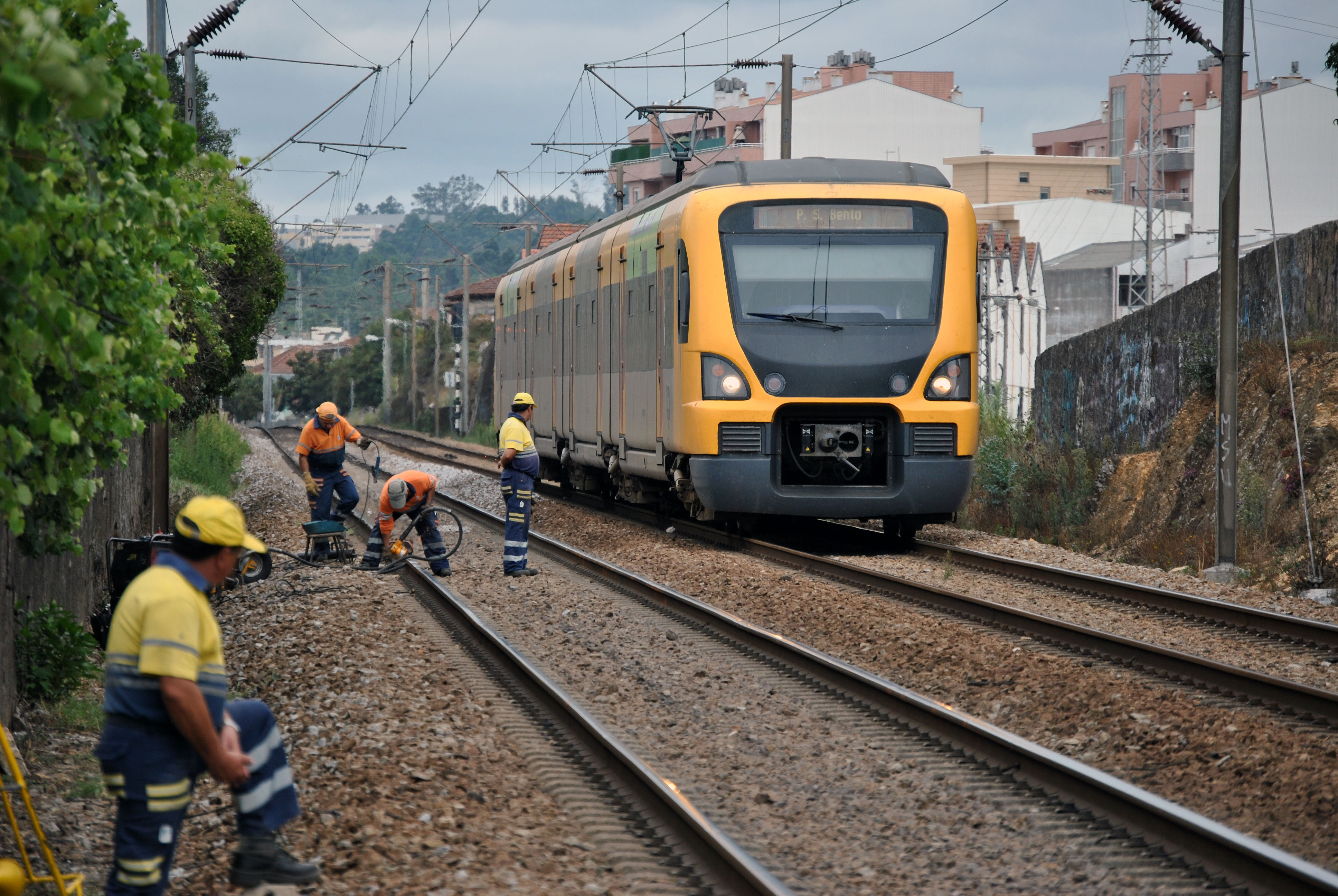 3400 e obras na via em Rio Tinto